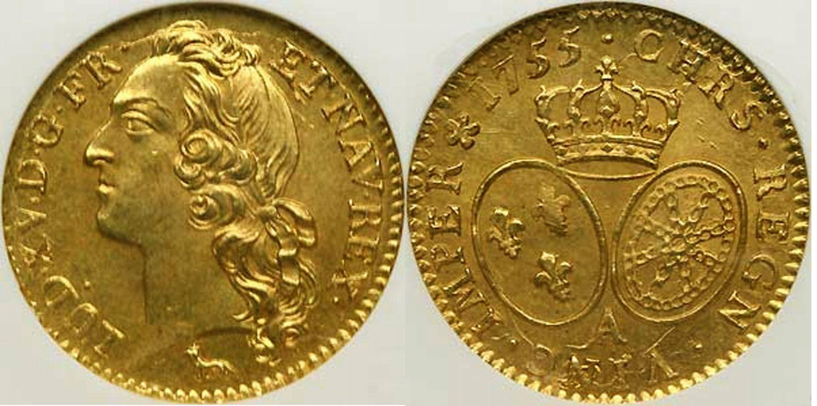 Photo de ma collection personnelle